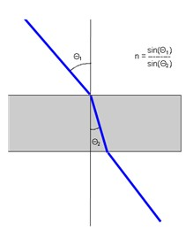 brekingsindex eigen tekening